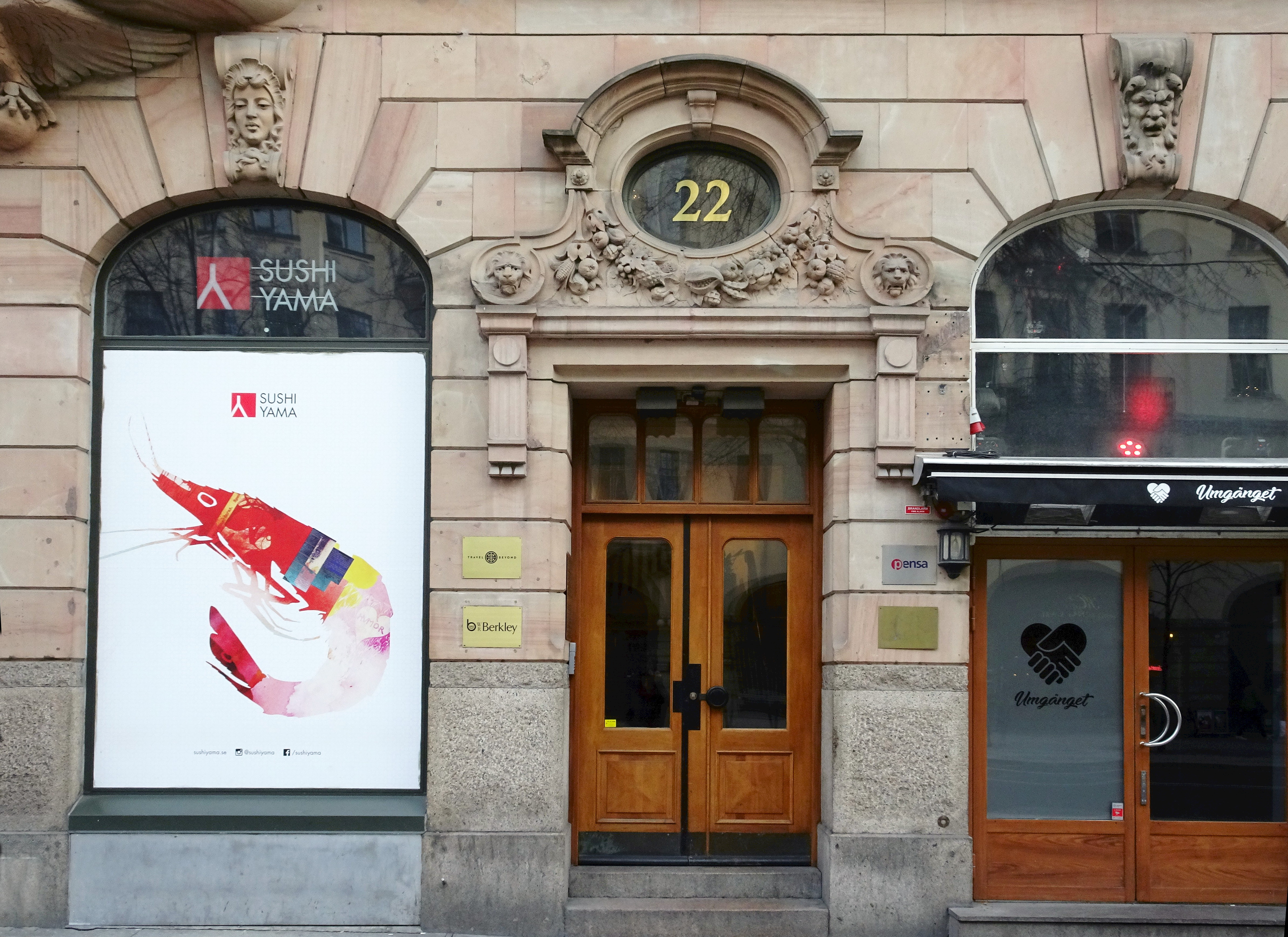 Birger Jarlsgatan 22. Byggnadsår 1897-1900, arkitekt Sam Kjellberg, byggherre Lars Östlihn.